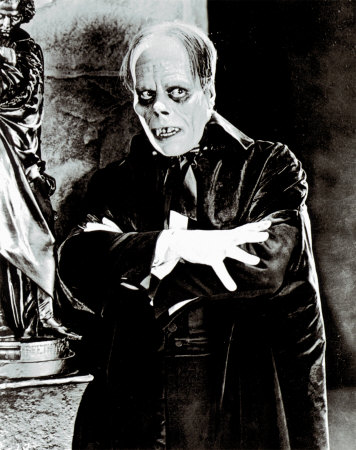 Lon Chaney en el jorobado de notredame